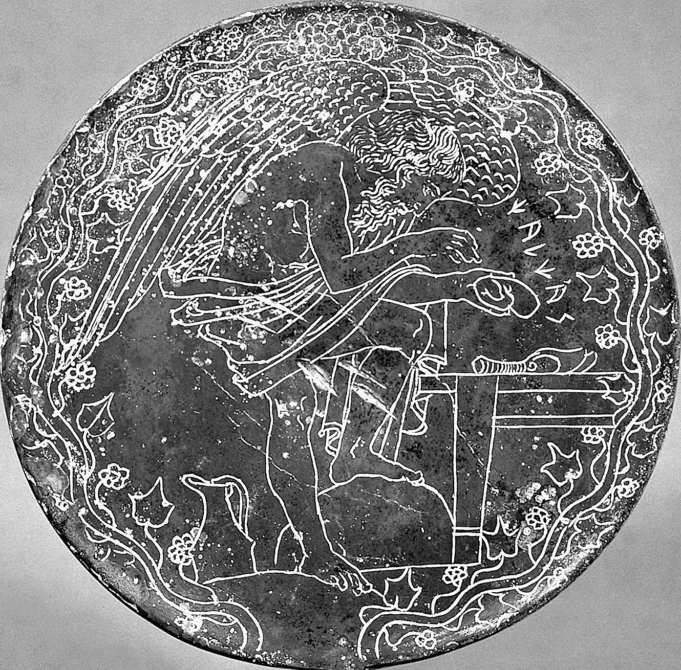 Miroir étrusque avec représentation de Calchas sous la forme d'un Haruspice. Vulci, Ve siècle av. JC. Musée du Vatican.